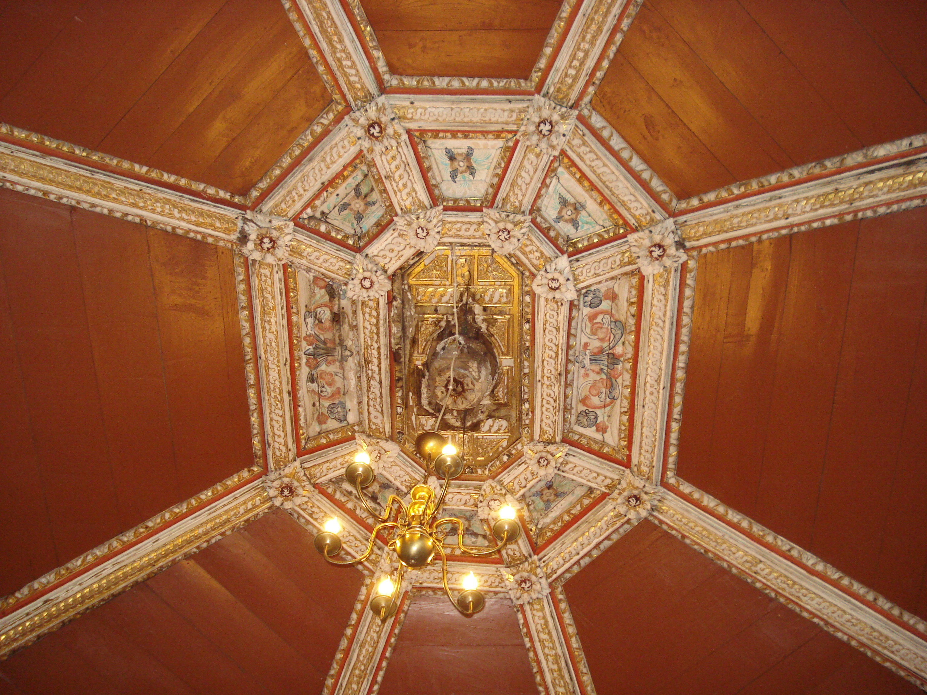 Oucidres-Abóboda da Capela do Larouco